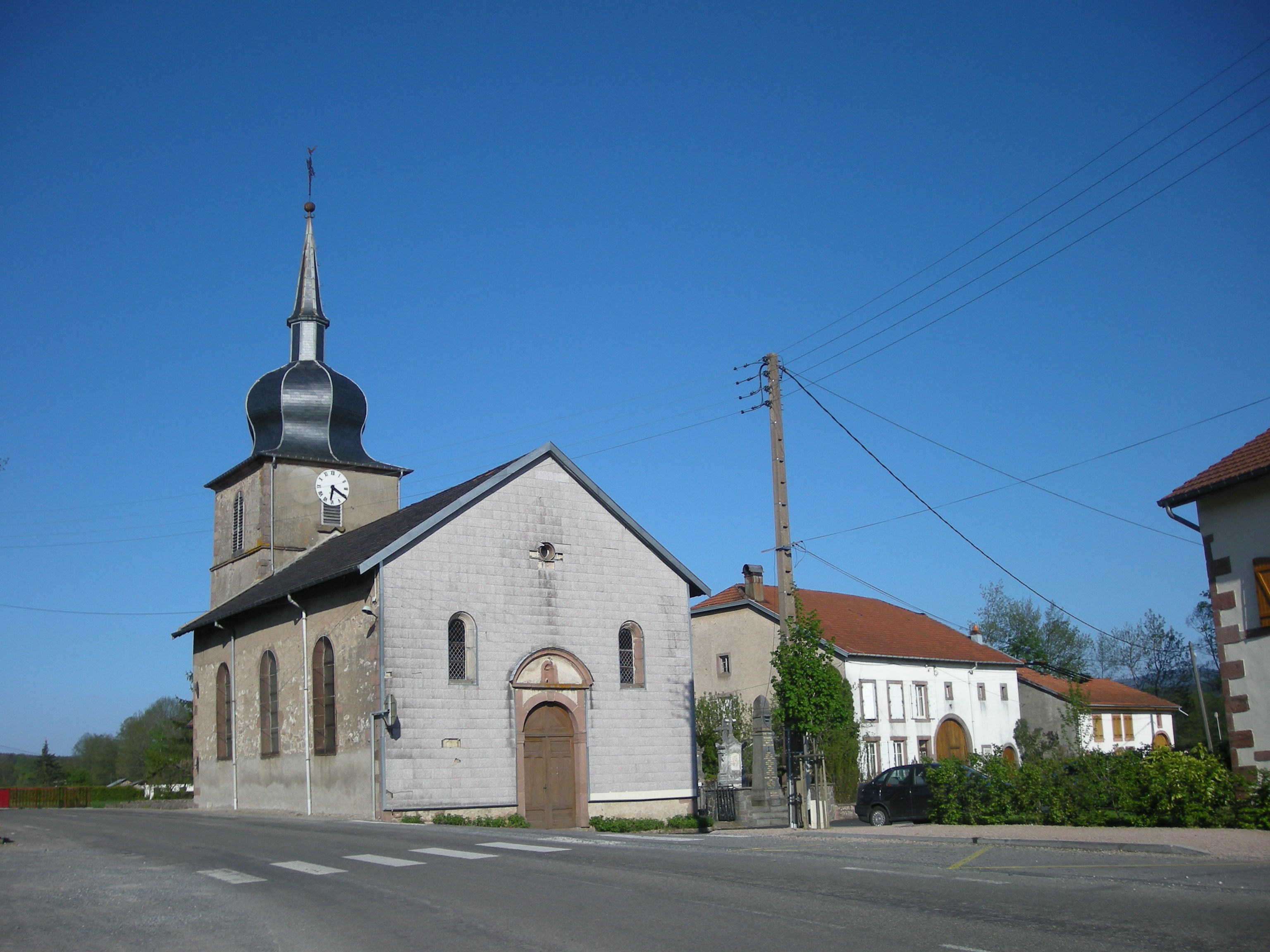 L'église de Remomeix (Vosges)